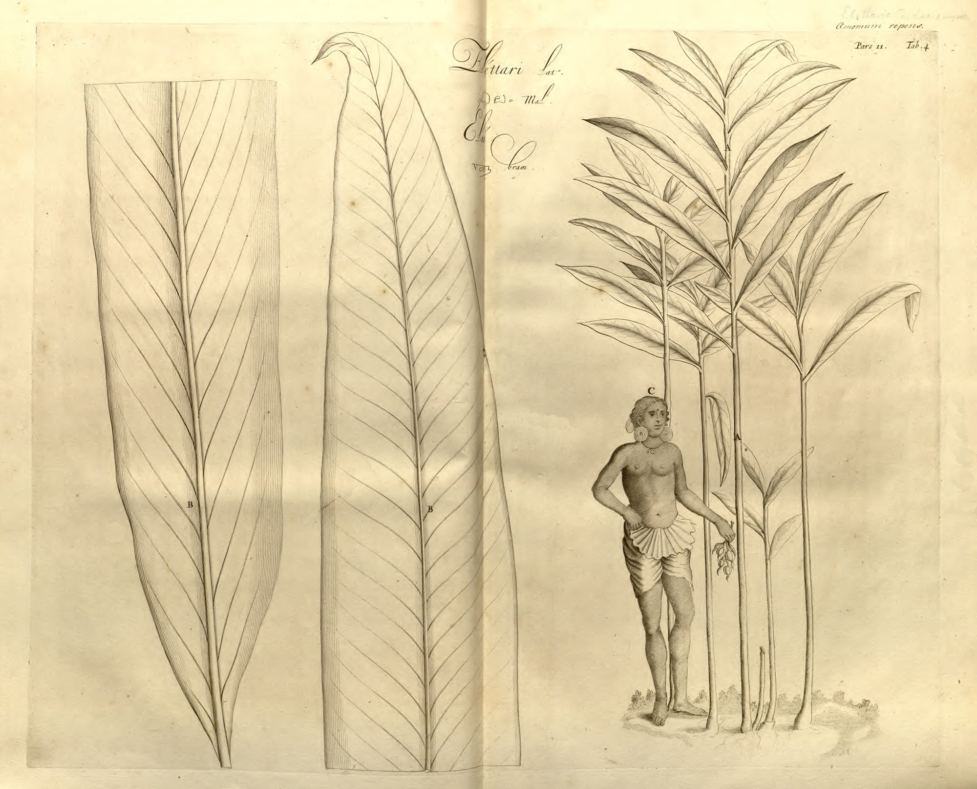 Elettari (in Malayalam) ; vol. 11, plate 4 Page URL : [1]